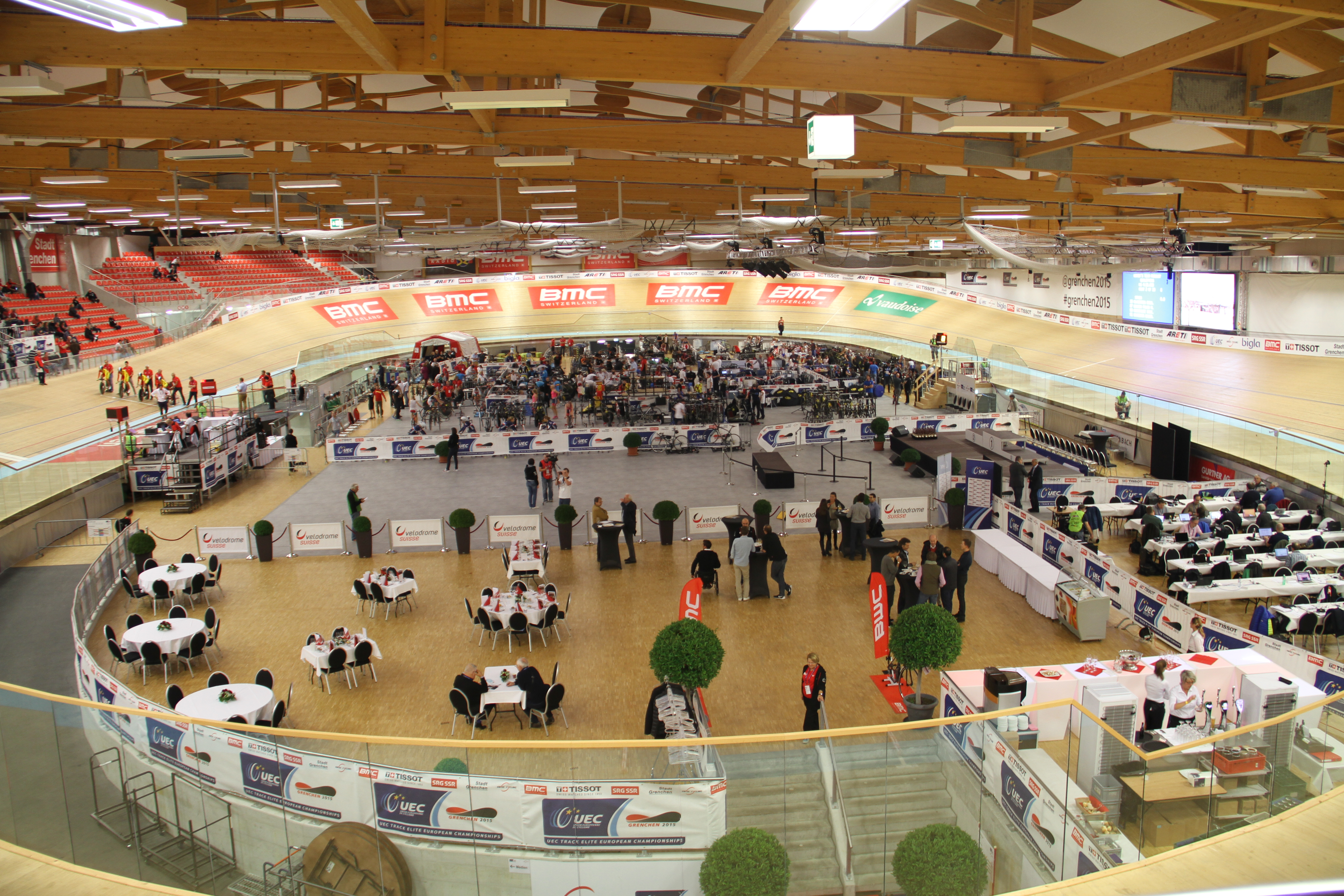 The making of this document was supported by the Community-Budget of Wikimedia Germany. Innenraum des Velodrome Suisse